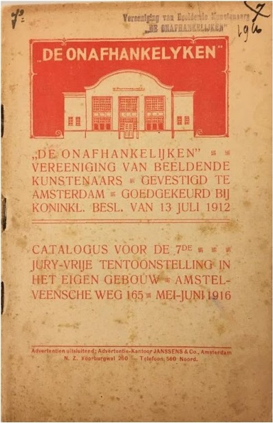 tent.cat. De Onafhankelijken, Catalogus voor de 7de jury-vrije tentoonstelling in het eigen gebouw, omslag.